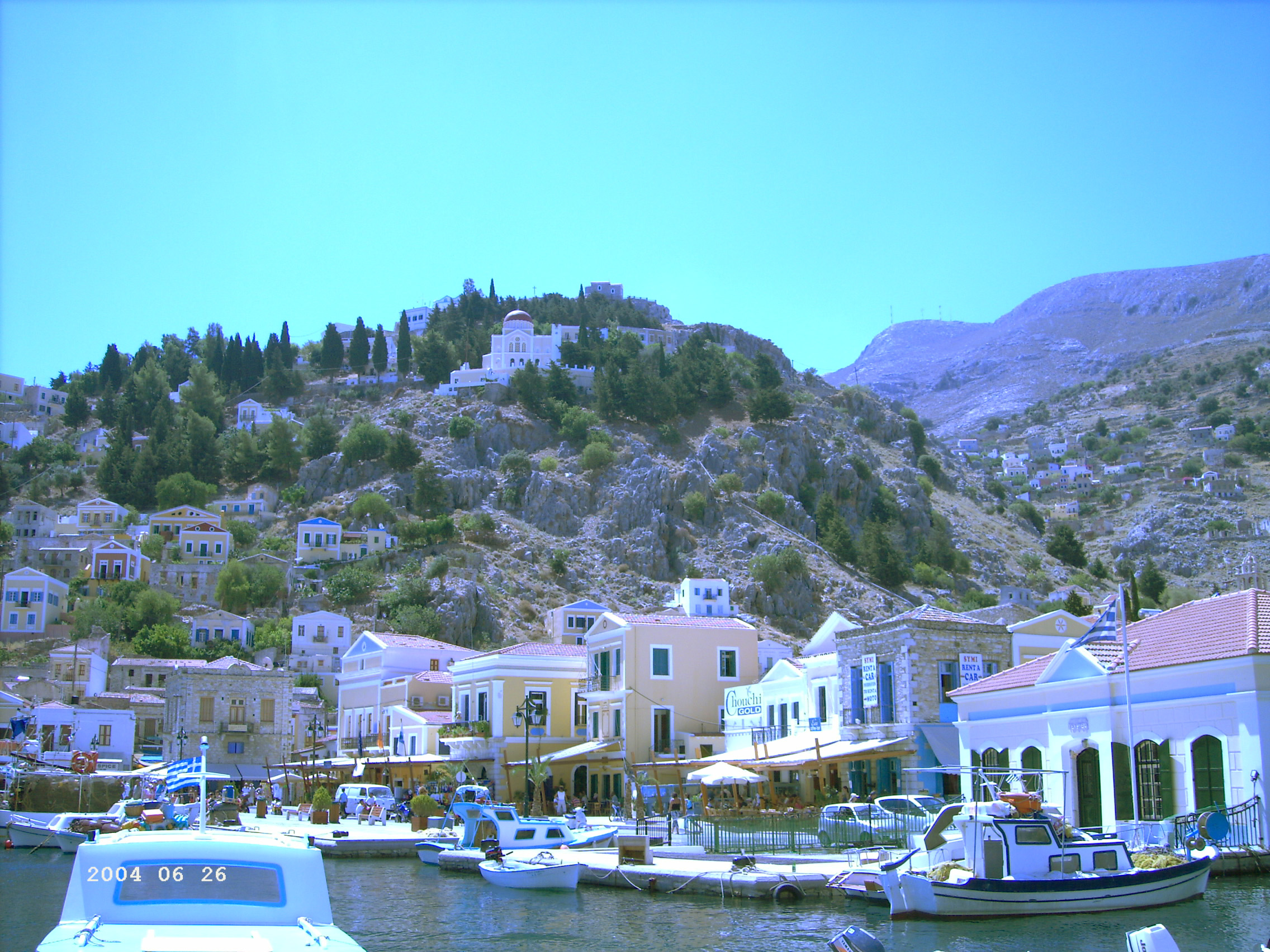 Een gezicht op Simi, gezien vanuit de haven.